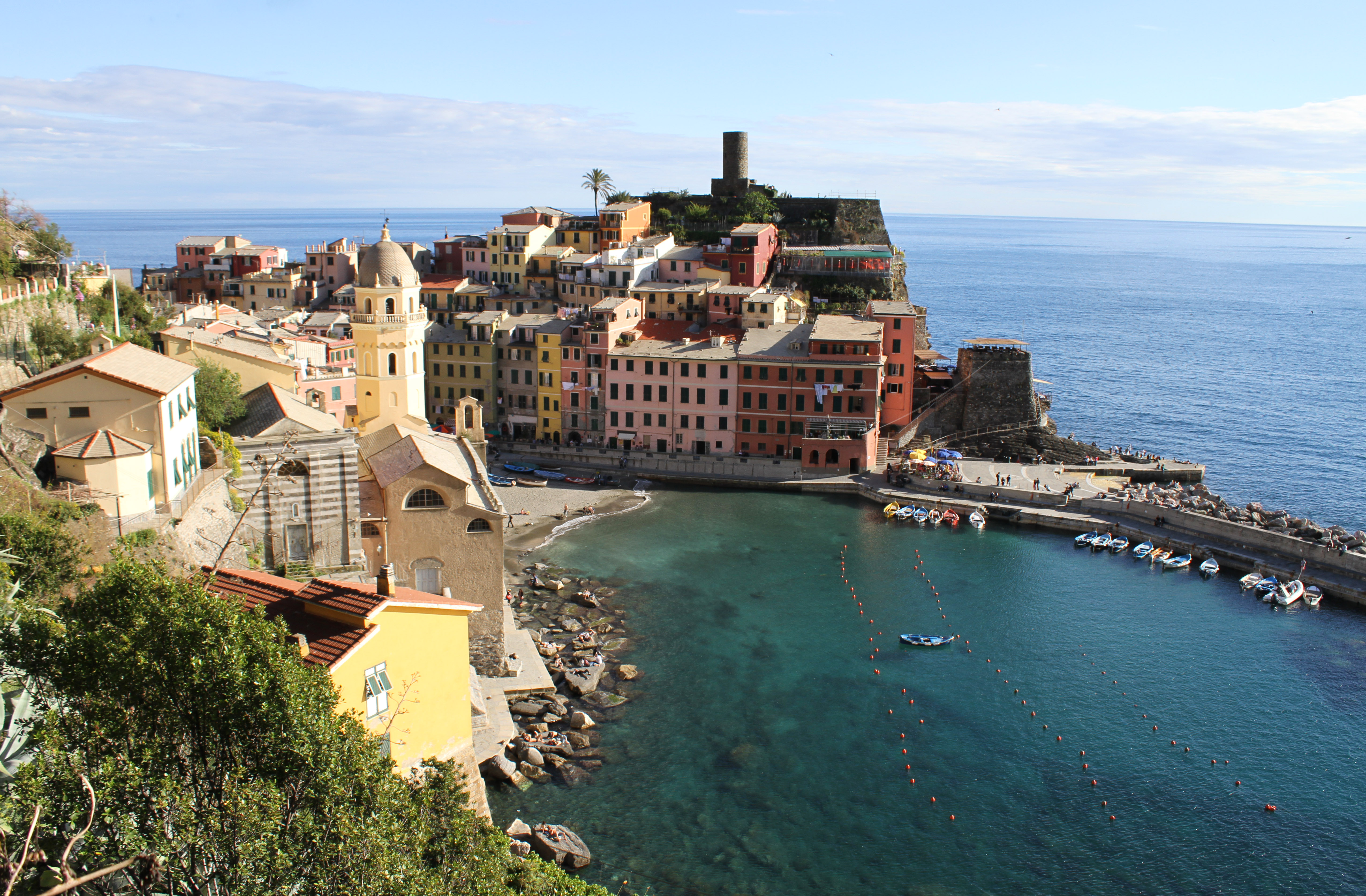 Vernazza. A sinistra: la chiesa di Santa Margherita d'Antiochia.